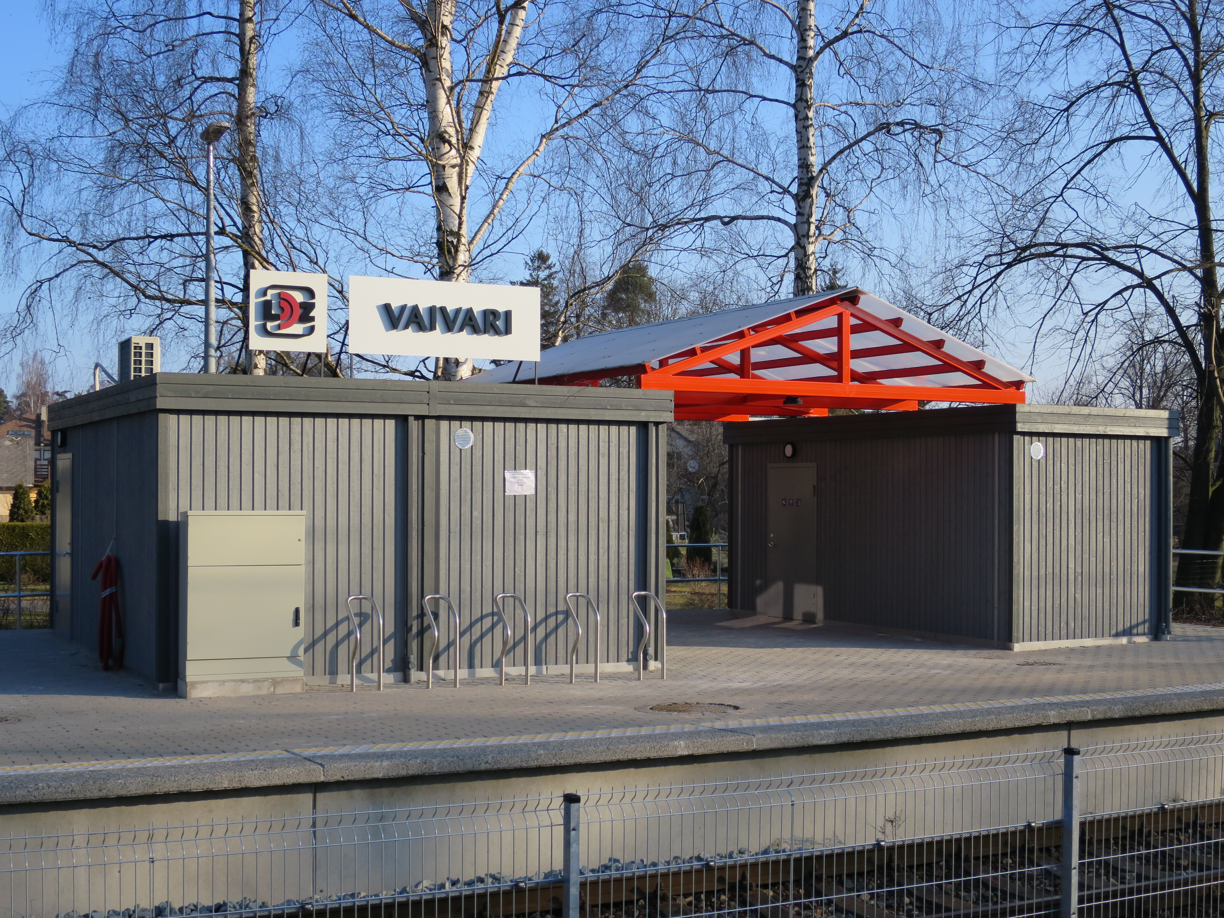 Vaivaru stacija pēc rekonstrukcijas